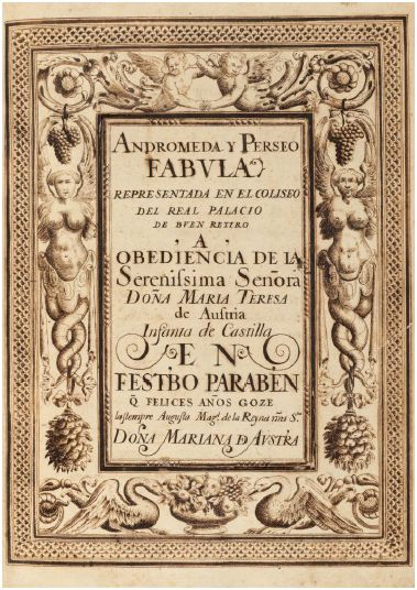 Portada del manuscrito